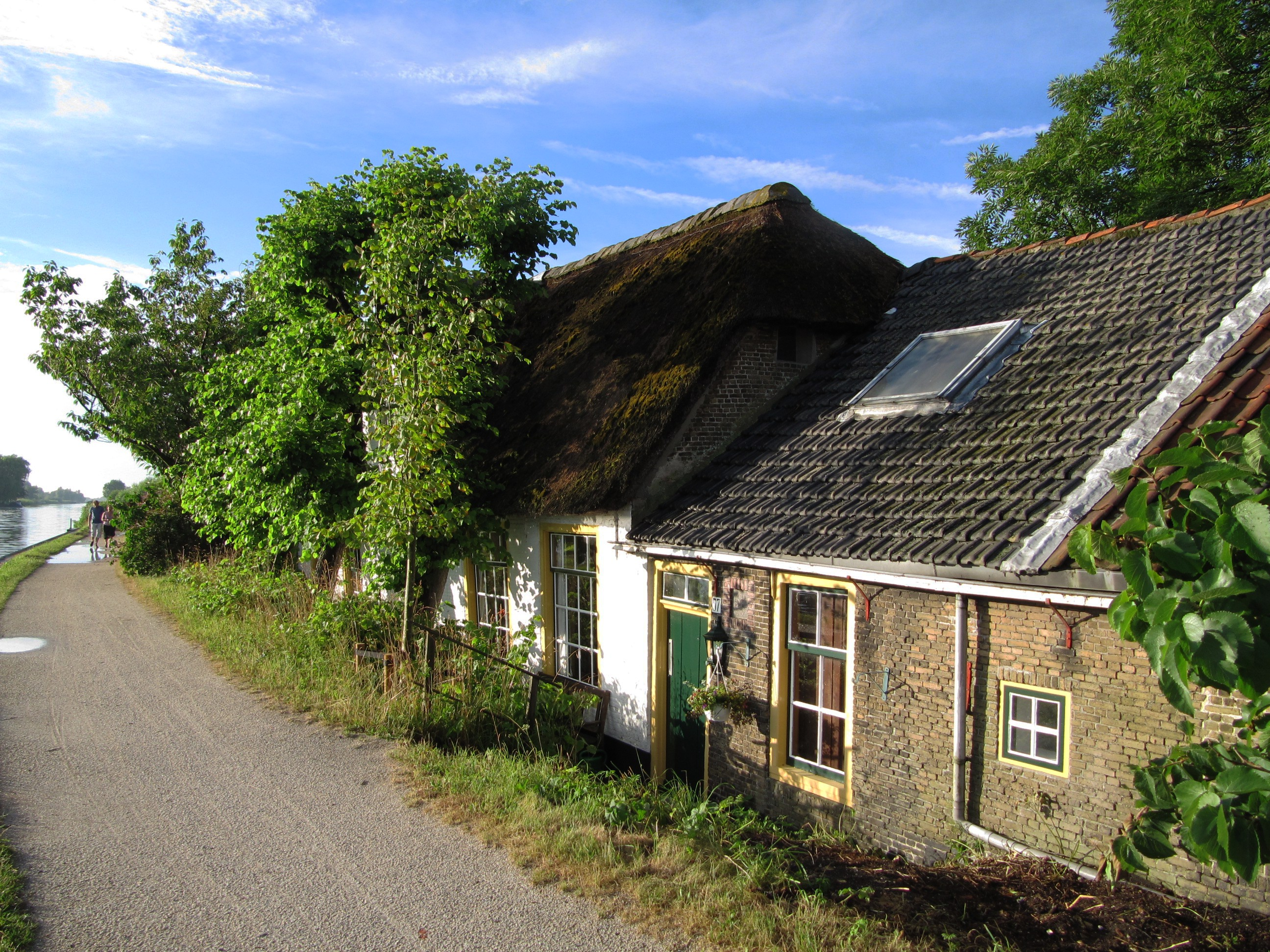 Schipluiden - Vlaardingsekade 57.jpg, rijksmonument